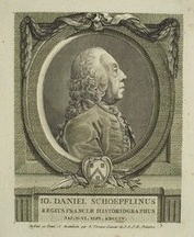 Johann Daniel Schöpflin (1694-1771), Historiker